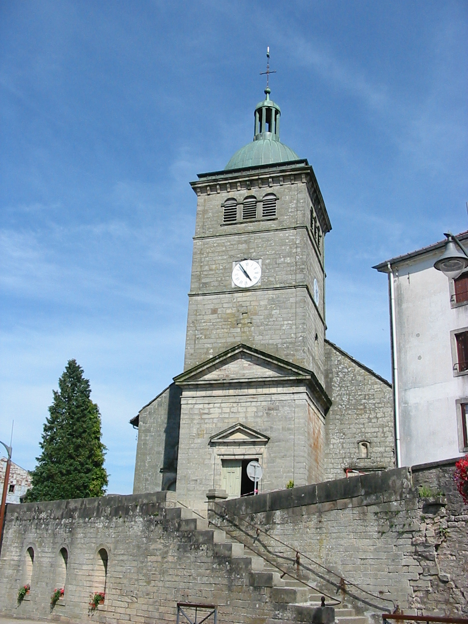 L'église Saint-Gengoult à Hadol, commune des Vosges.